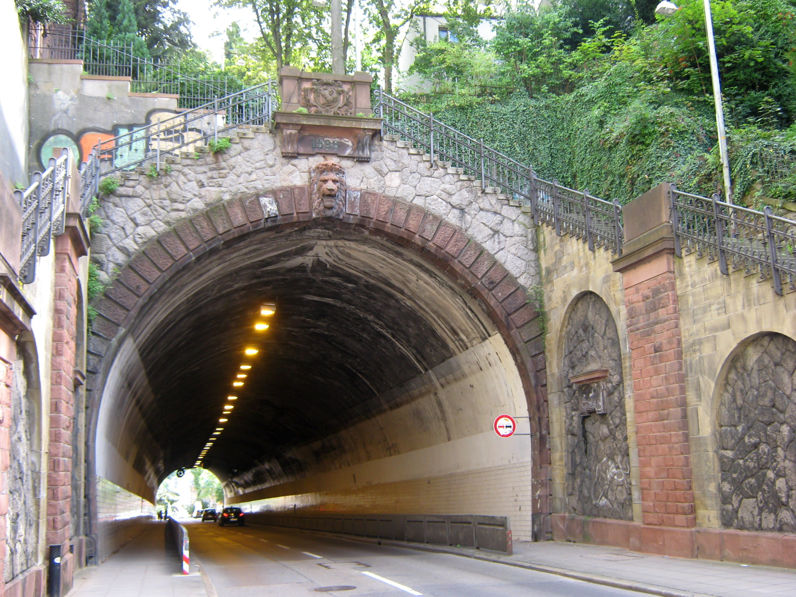 Der Schwabtunnel in Stuttgart wurde 1894-1896 von Karl Kölle gebaut. Das Westportal wird von einer Balkon mit Stadtwappen und einem Löwenkopf als Schlußstein geschmückt. Der 125 m lange Tunnel verbindet die Stadtteile Stuttgart-West und Heslach.